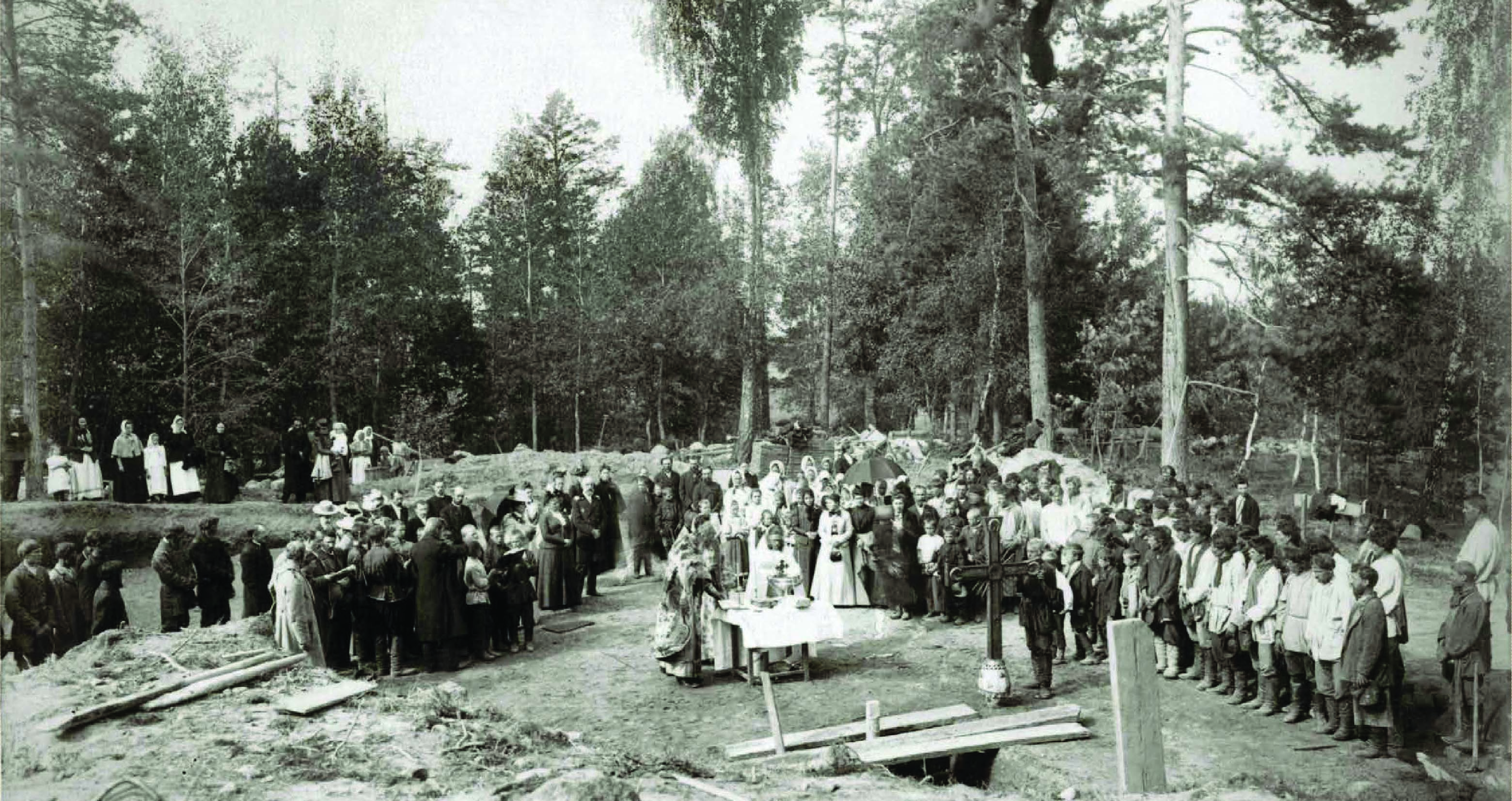 Закладка Храма Святого Духа в Талашкино.